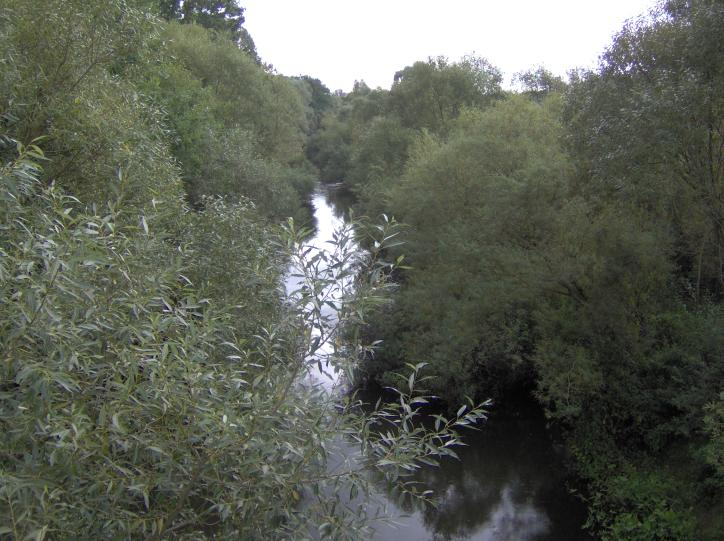 image from plwiki - Rzeka Ina w górę od centrum Goleniowa